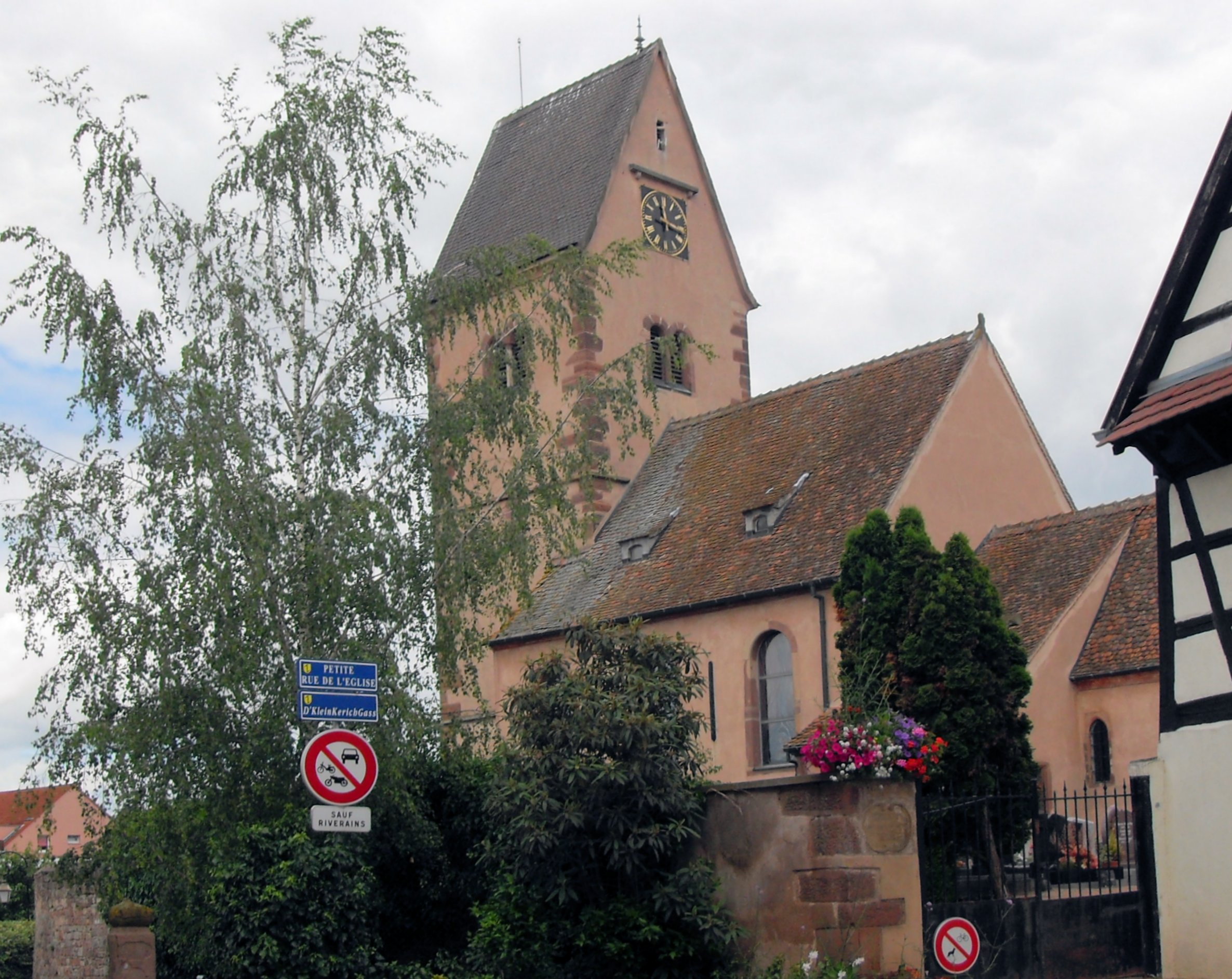 Temple protestant Saint-Pierre à Wolfisheim